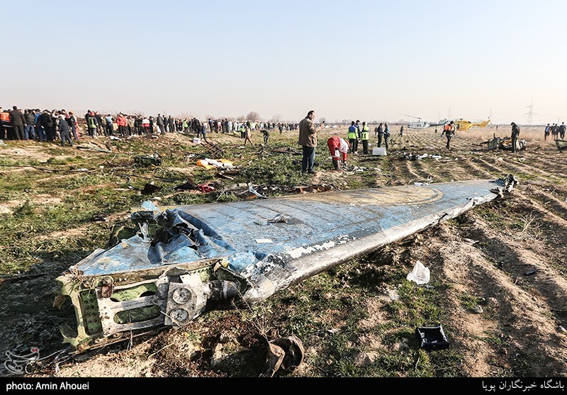 سقوط هواپیمای بوئینگ ۷۳۷-۸۰۰ در اثر شلیک موشک پدافند هوایی سپاه پاسداران